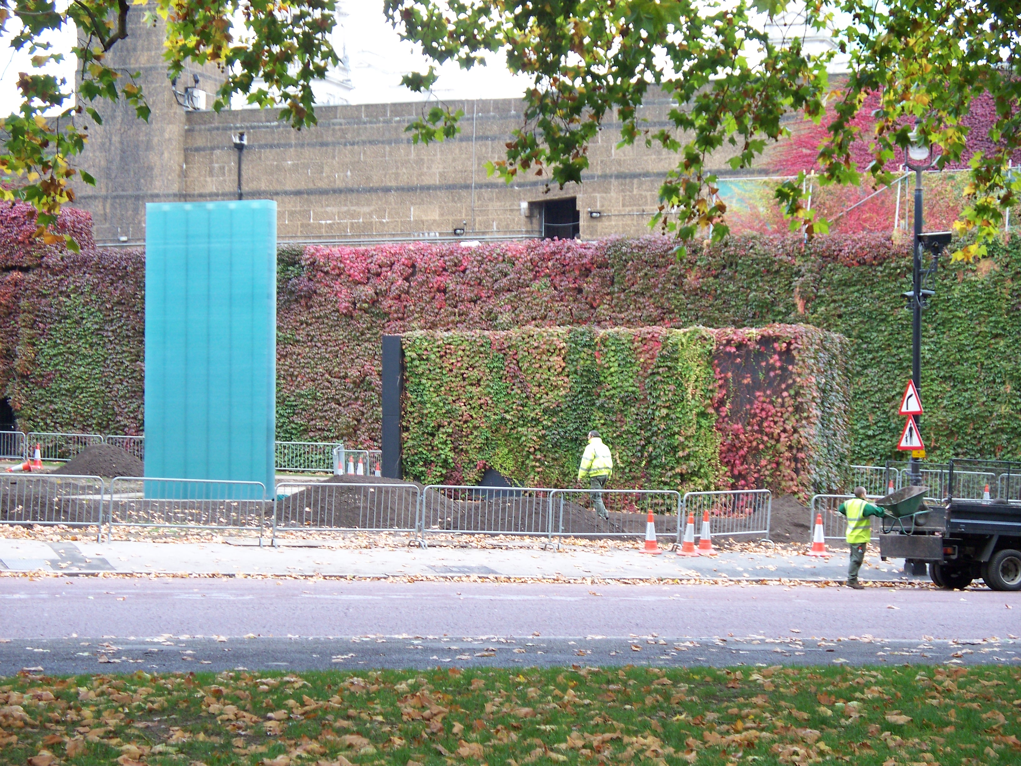 National Police Memorial, London